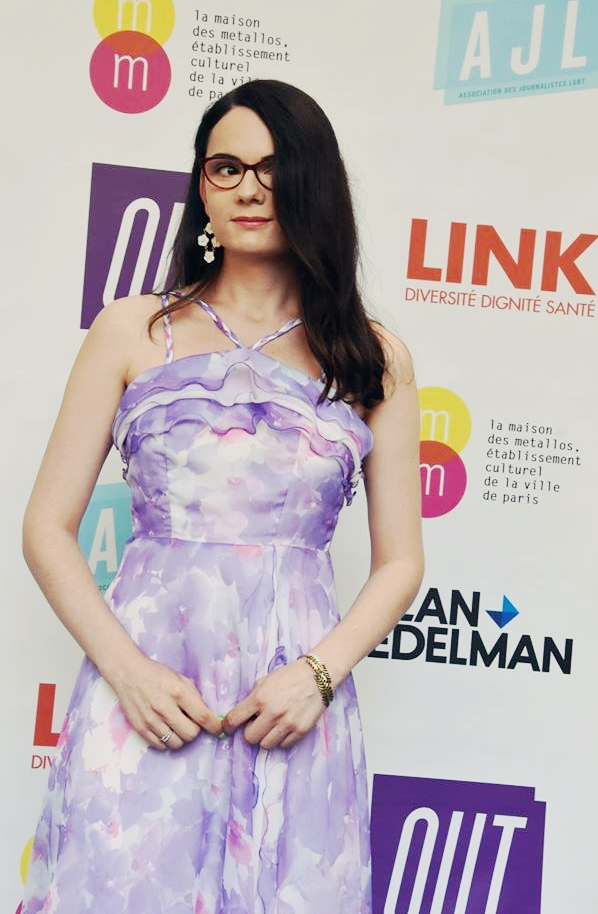 Laura Badler à la seconde édition des Out d'or en 2018.